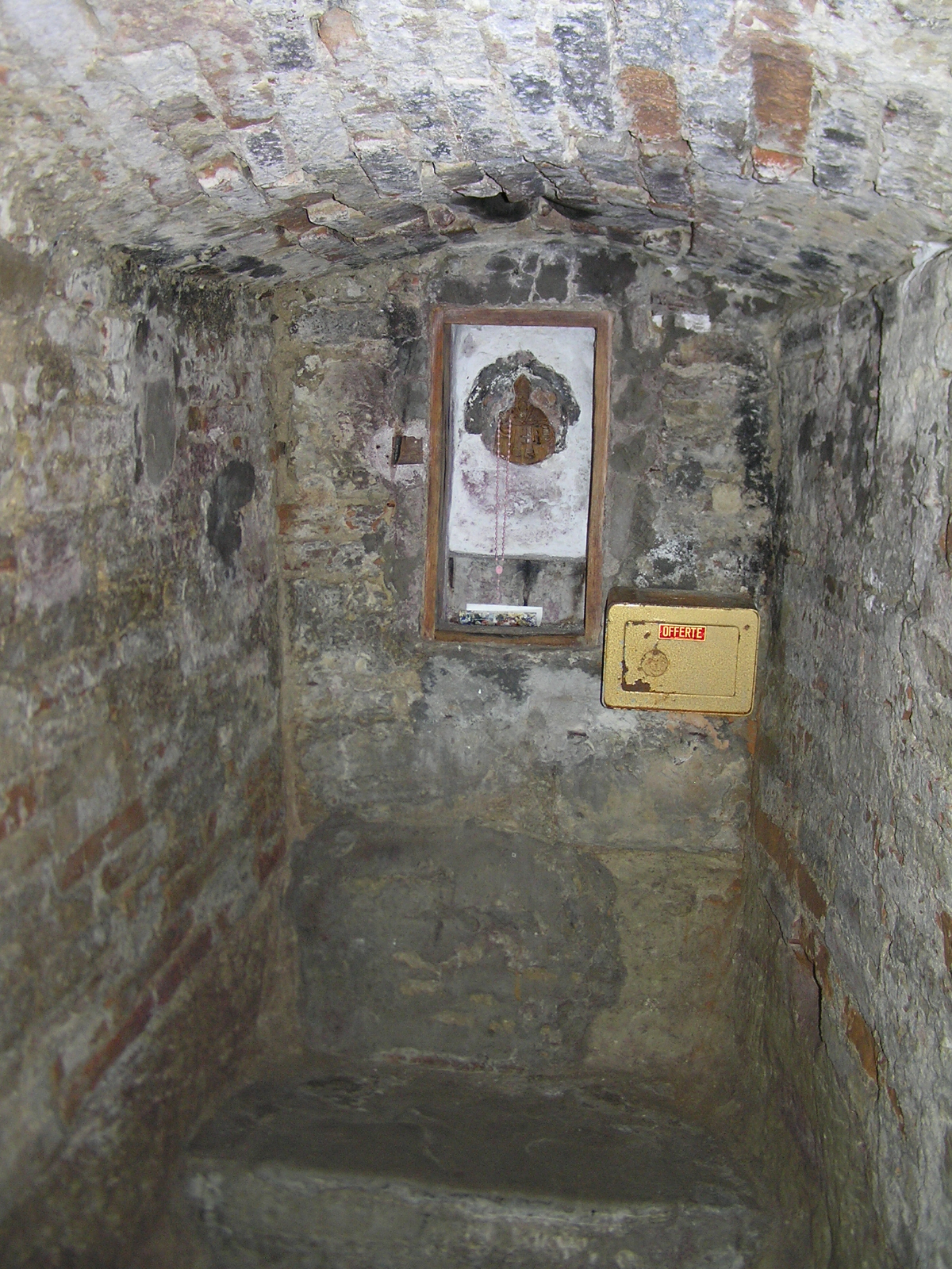 Scranno di Sant'Ellero, nel sacello dove il Santo si ritirava a pregare. Da secoli viene utilizzato dai fedeli come "rimedio popolare", unito alla preghiera, contro il mal di schiena.